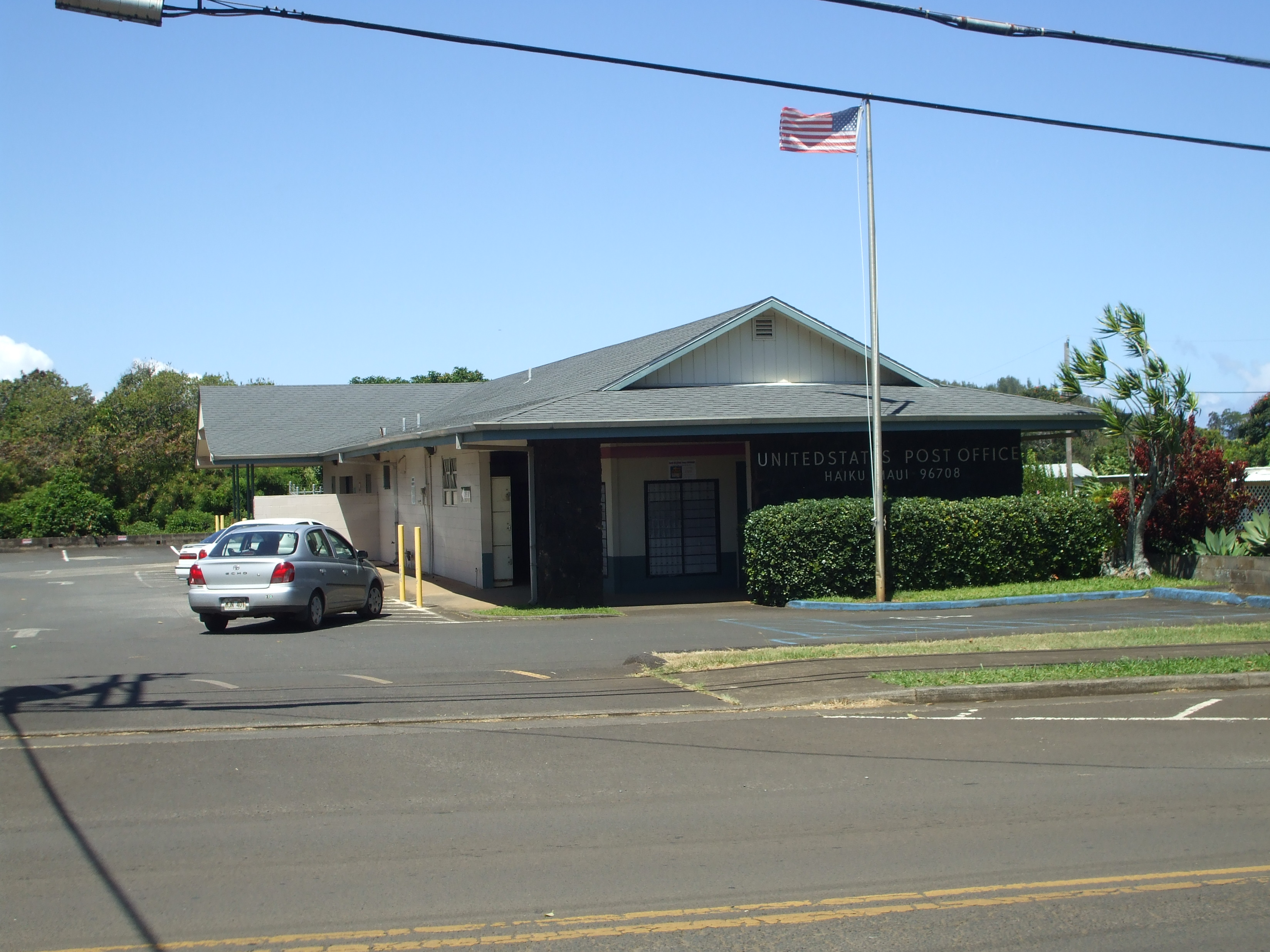 Hailu Maui Post Office.